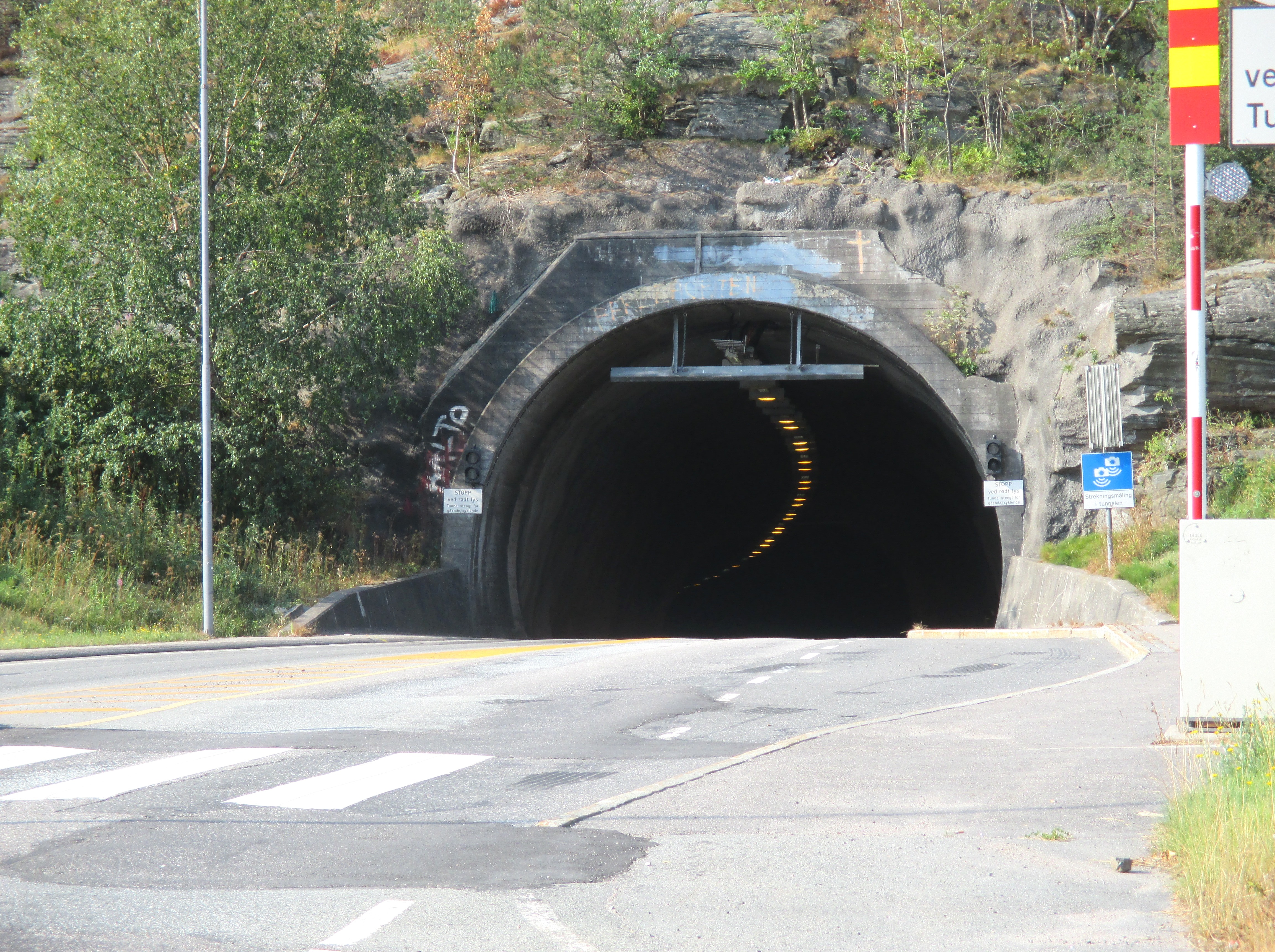 Flekkerøytunnelen fra landsiden